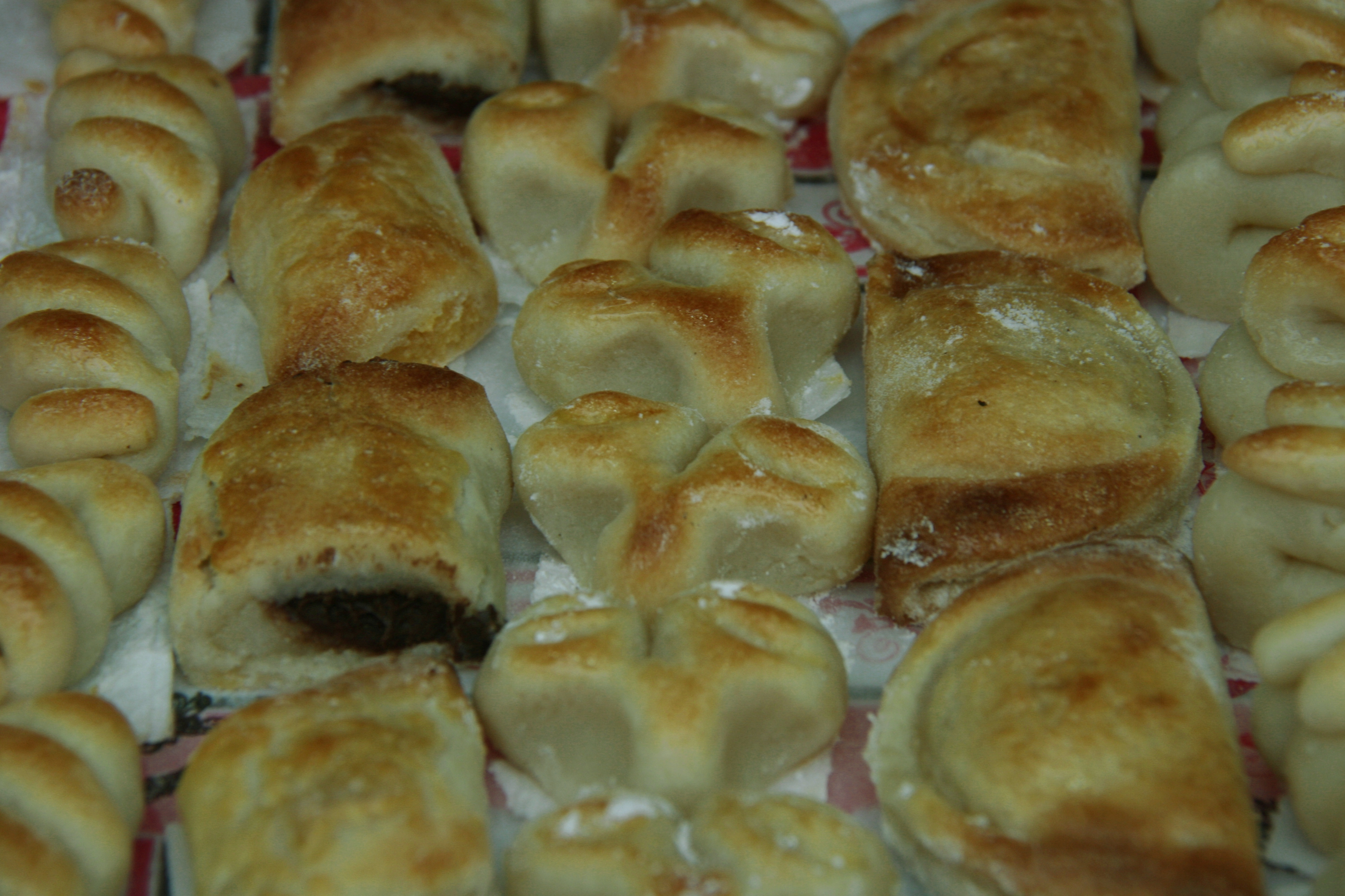 Surtido de mazapanes